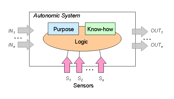 Boarisch: A autonomes Rechnasystem.